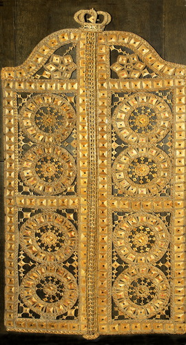 Царскія вароты Museum of Belarusian Folk Art Native nameМузей беларускага народнага мастацтваLocationMinsk district, BelarusCoordinates54° 03′ 36″ N, 27° 44′ 22″ E Established1979Website